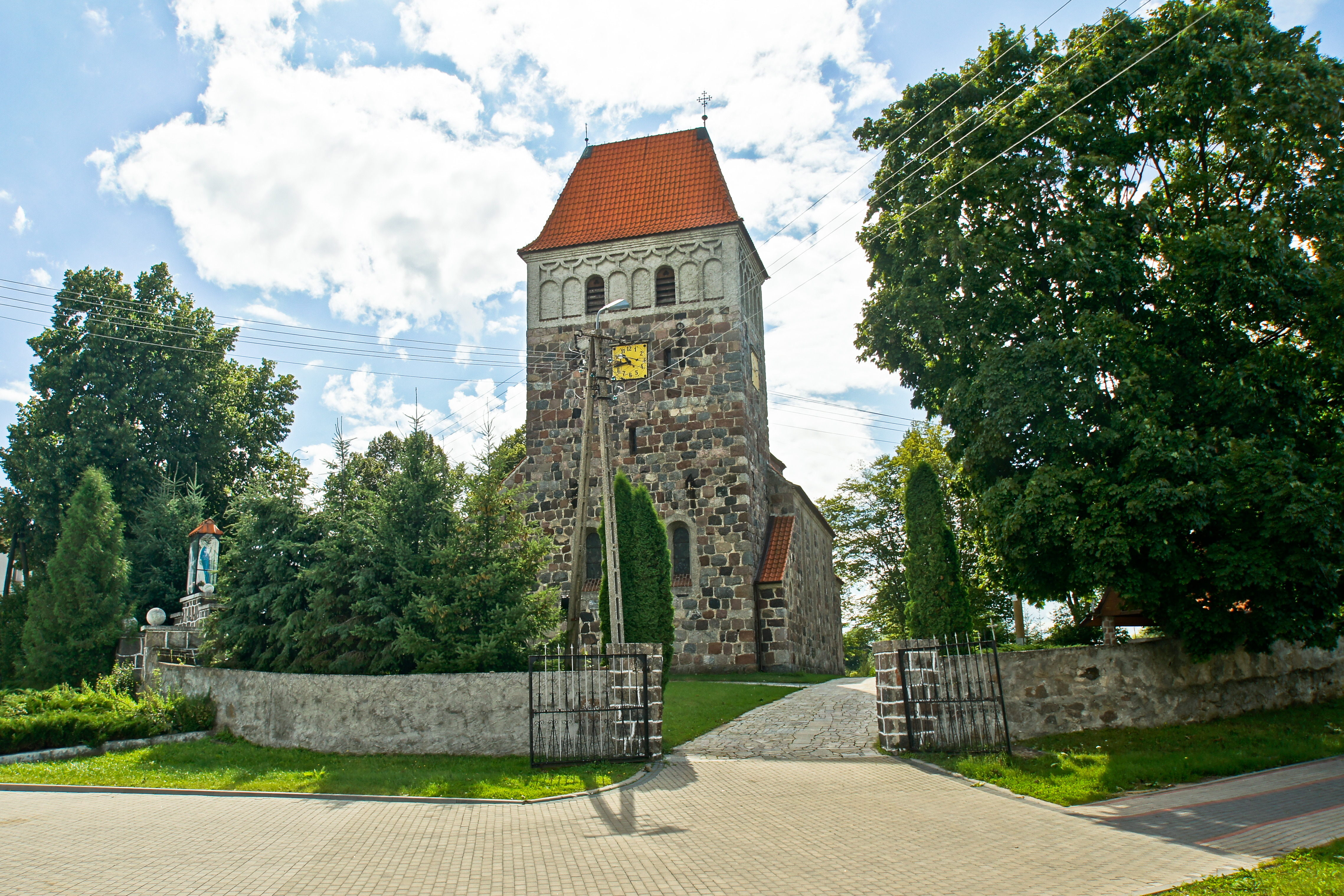 Zabytkowy kościół p.w. Wniebowzięcia NMP z roku 1924 we wsi Kalinowo (powiat ełcki). Zdjęcie wykonane techniką HDR.